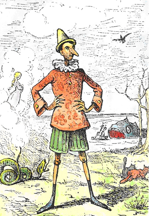 Pinocchio by Enrico Mazzanti (1852-1910) - the first illustrator (1883) of Le avventure di Pinocchio. Storia di un burattino - colored by Daniel DONNA